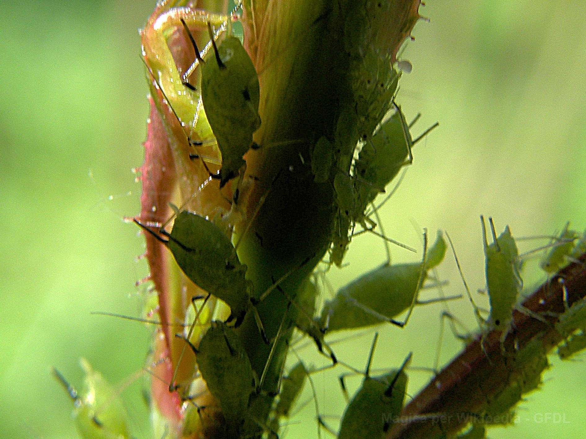 Pidocchi o afidi delle rose (Macrosiphum rosae)